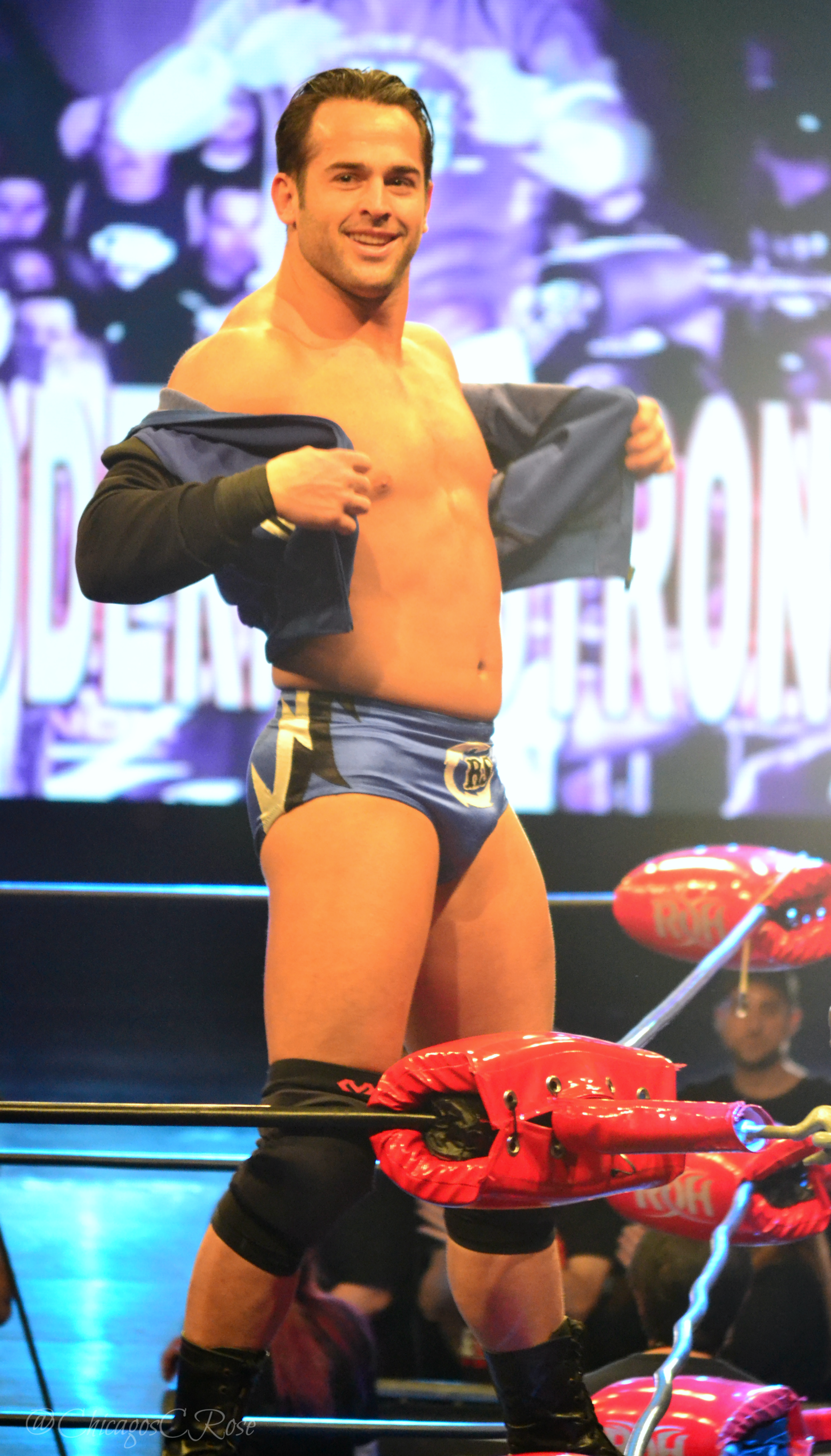 Roderick Strong entrant sur le ring en 2016.